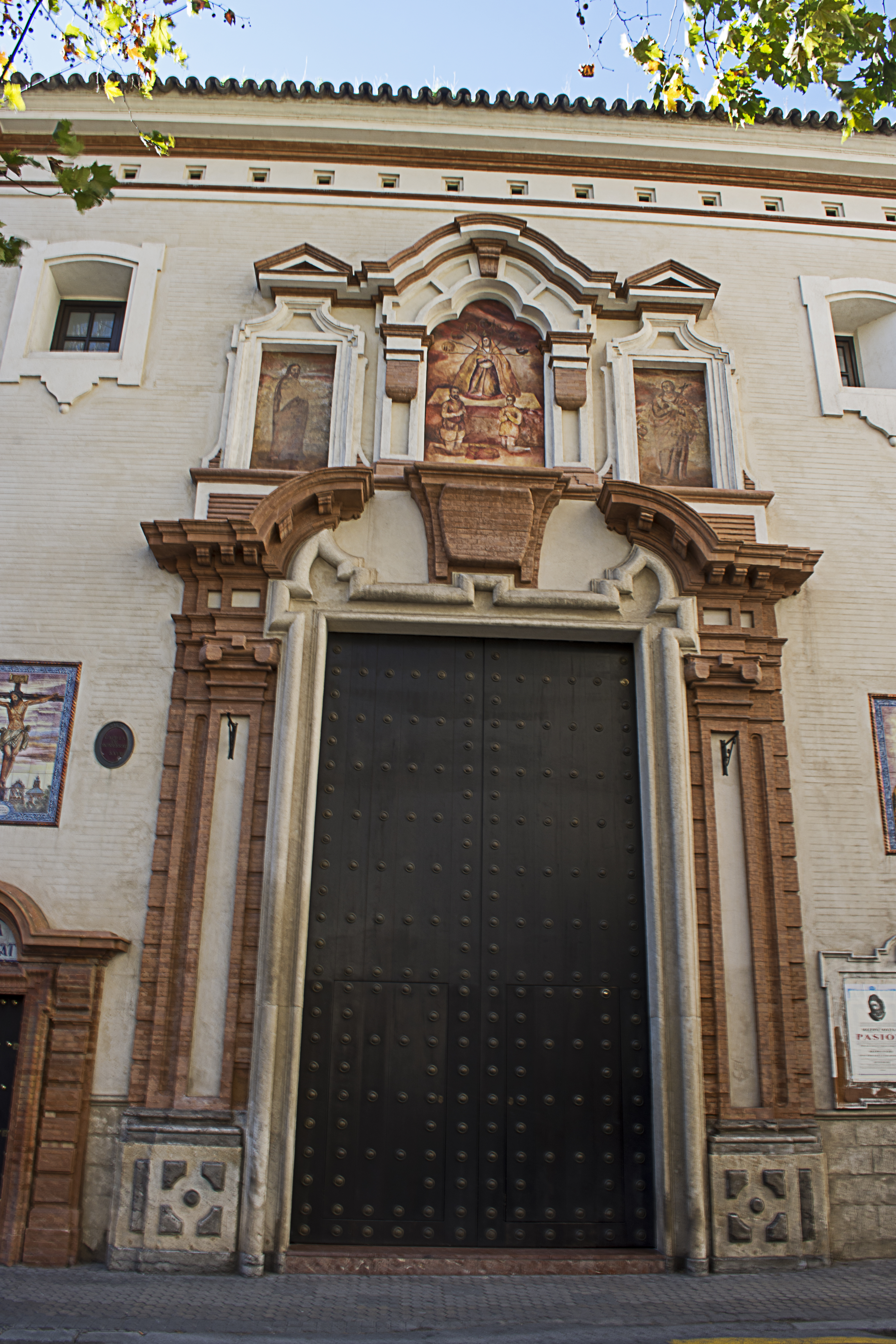 Iglesia de Montserrat en Sevilla